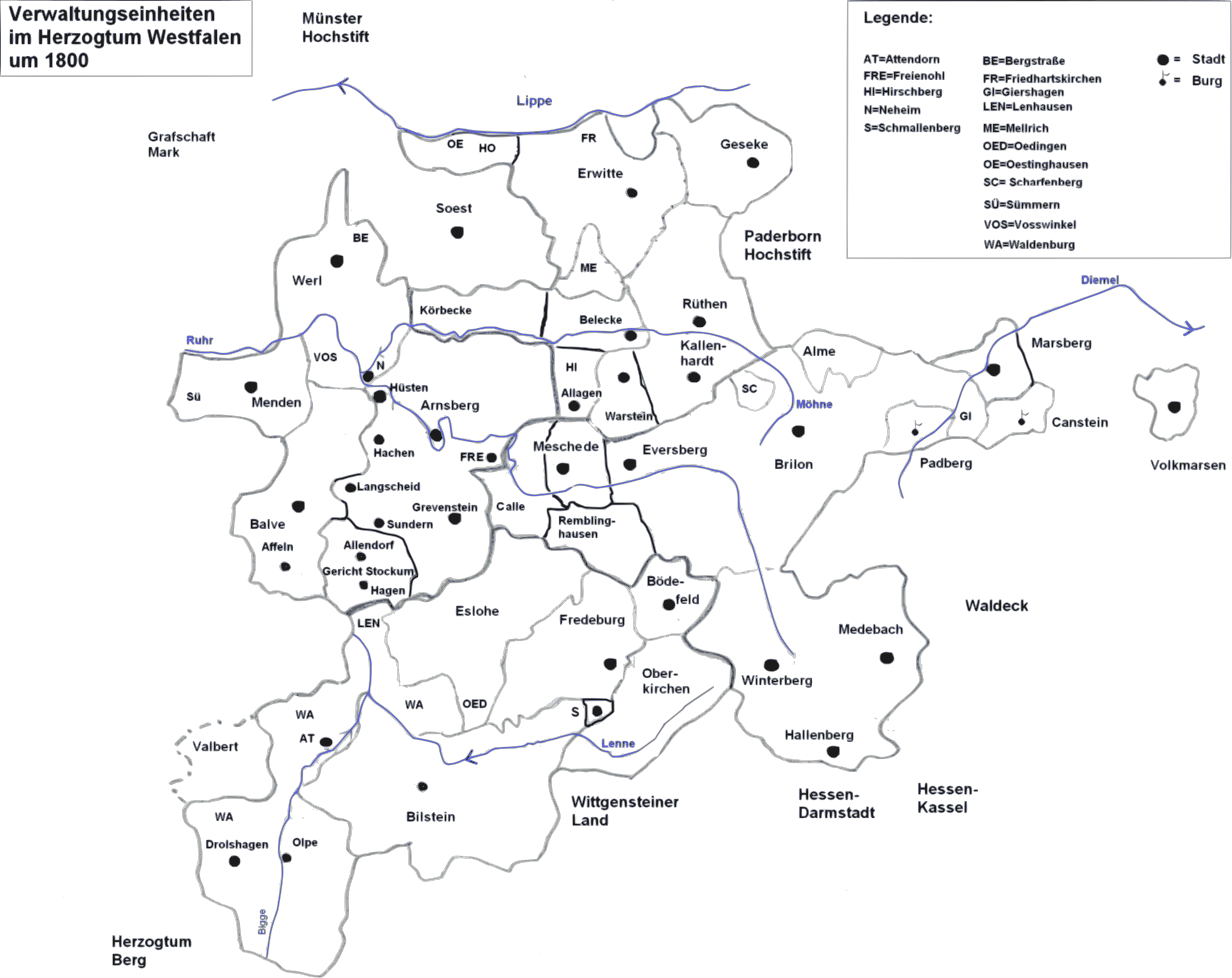 Verwaltungseinheiten im Herzogtum Westfalen im Jahr 1800